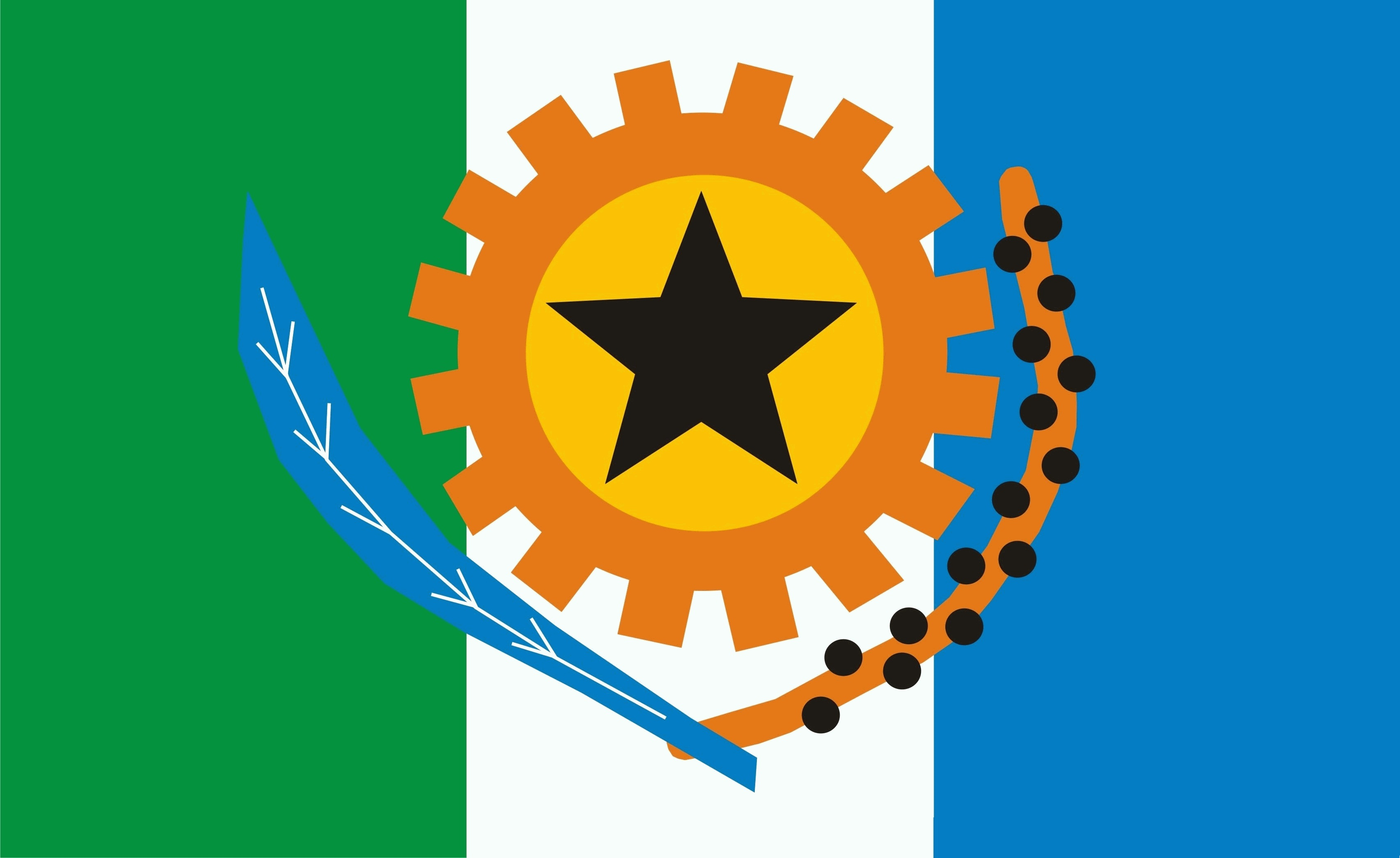 Bandeira